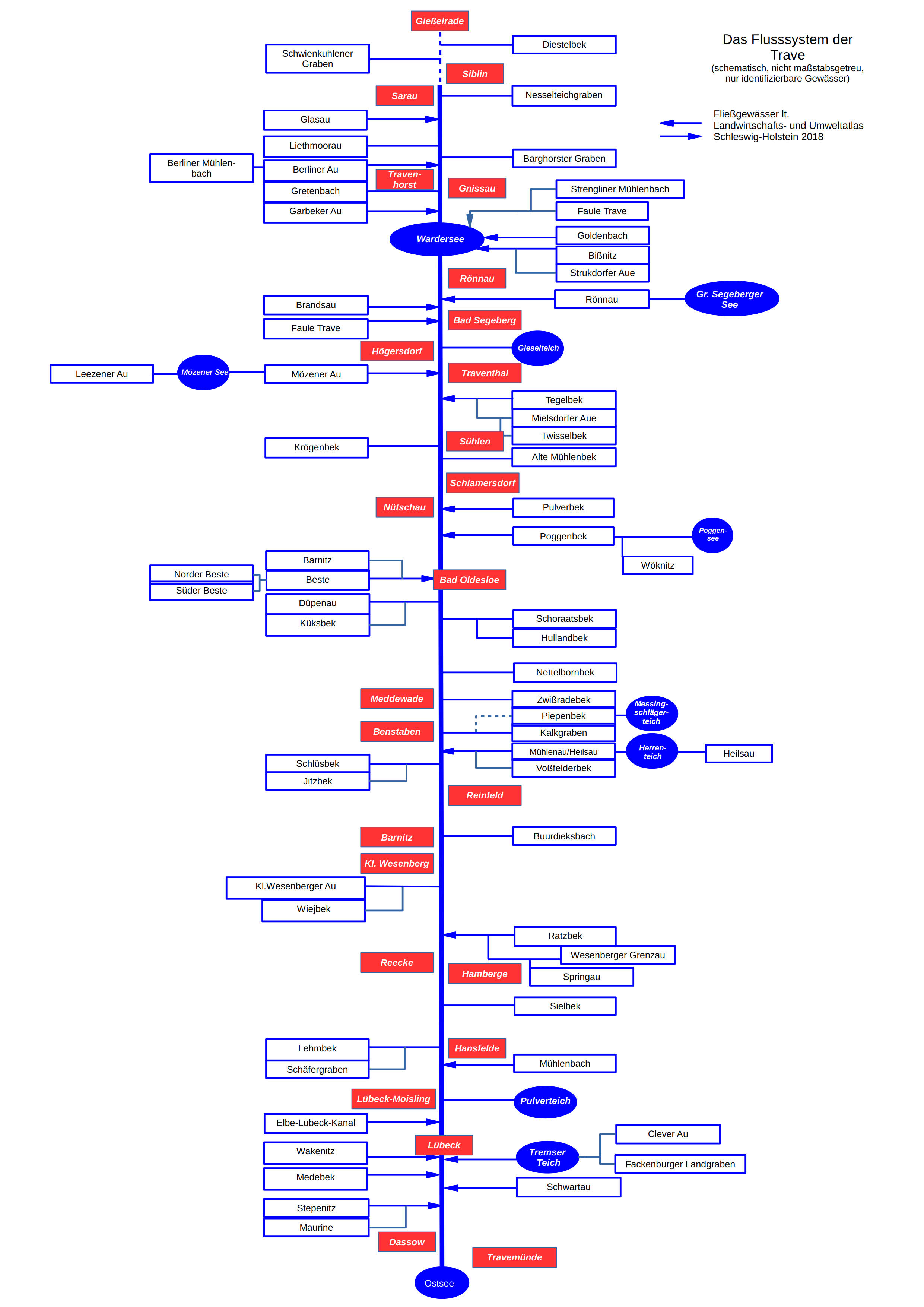 Trave / Schematische Darstellung des Flusssystemes